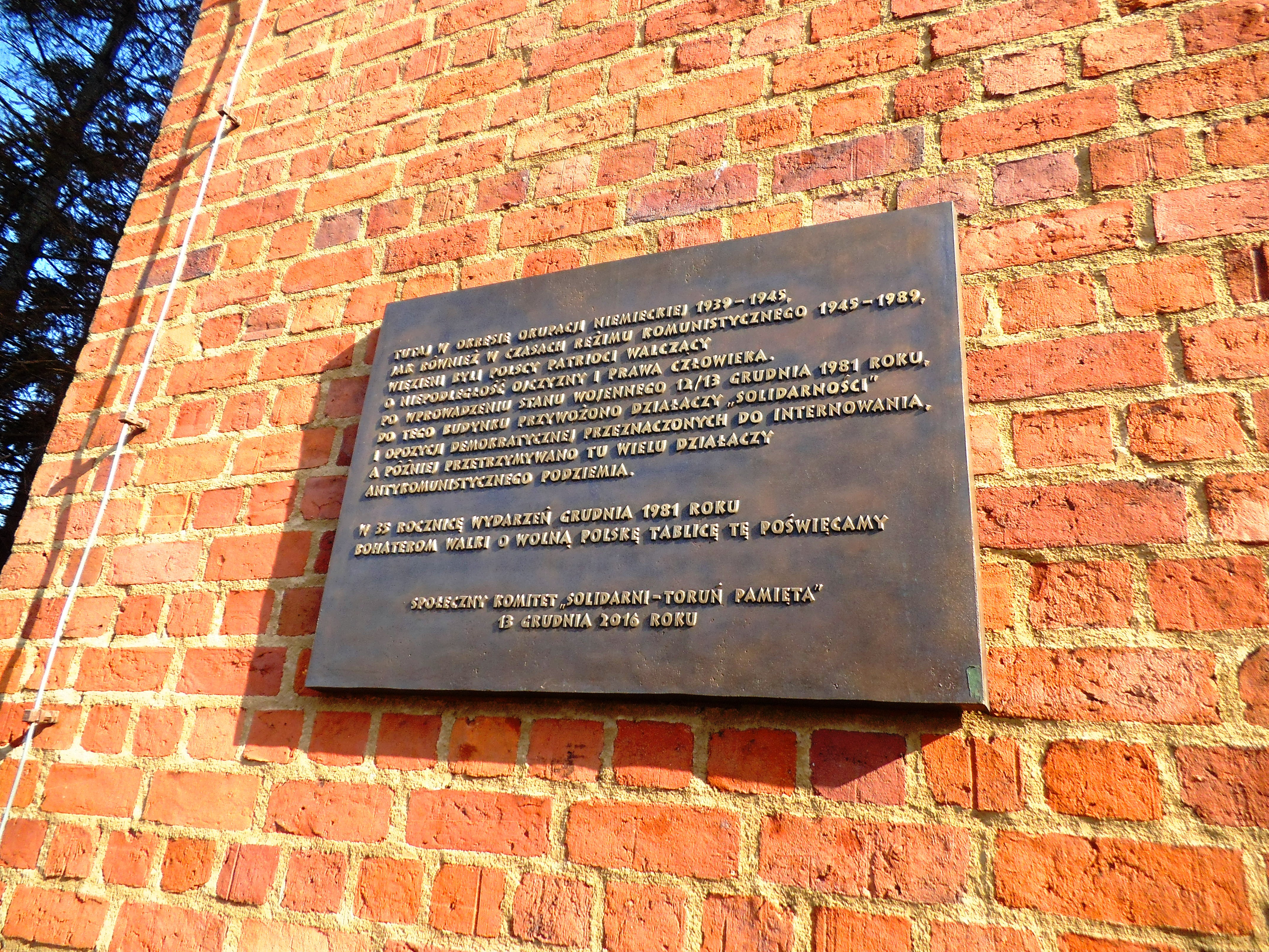 Budynek Urzędu Miasta Torunia (ul. Wały gen. Sikorskiego 10)